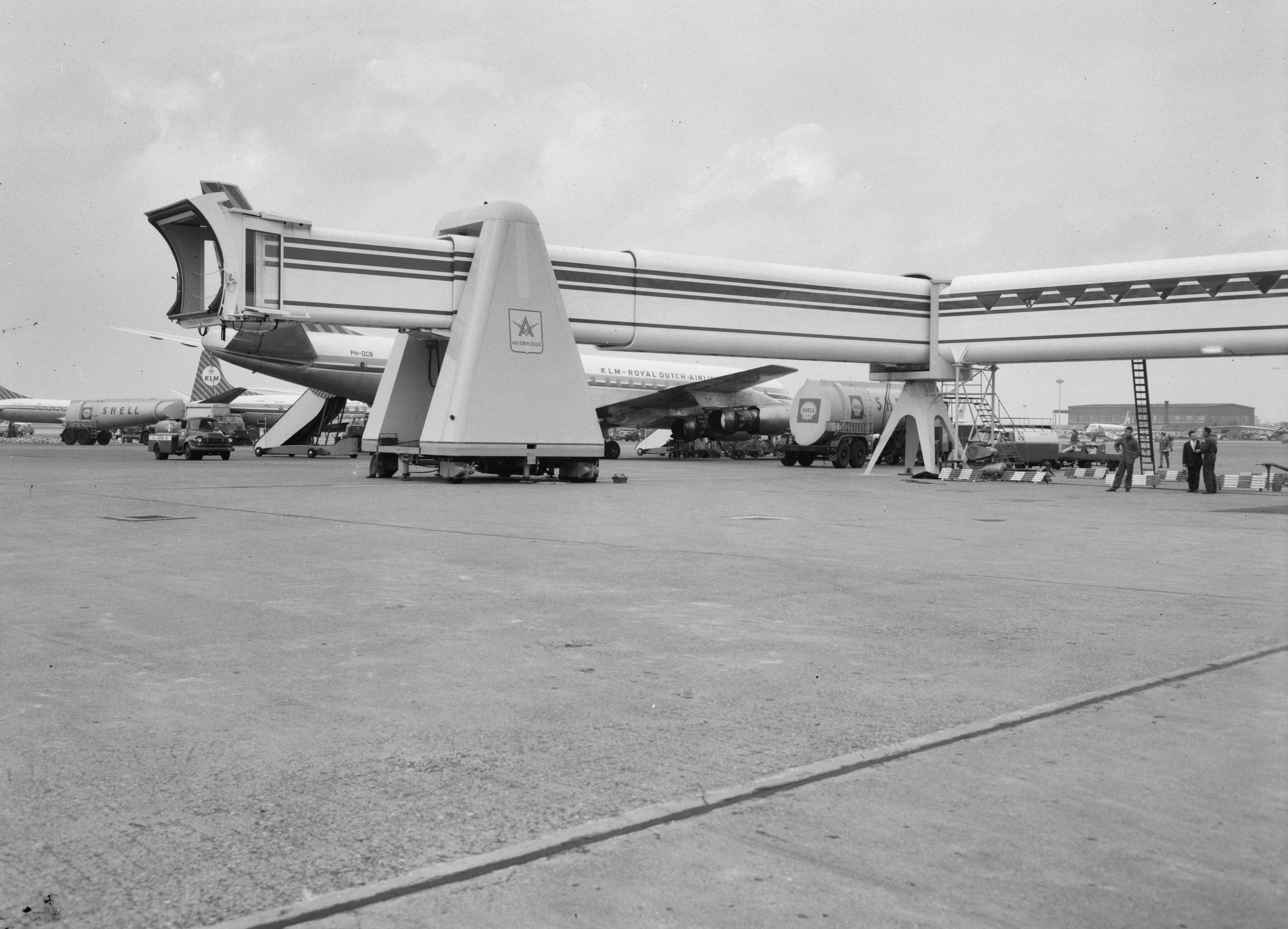 Collectie / Archief : Fotocollectie Anefo Reportage / Serie : [ onbekend ] Beschrijving : Montage Avio-bridge voor passagiers op Schiphol Datum : 13 april 1961 Locatie : Noord-Holland, Schiphol Trefwoorden : PASSAGIERS Fotograaf : Bilsen, Joop van / Anefo Auteursrechthebbende : Nationaal Archief Materiaalsoort : Negatief (zwart/wit) Nummer archiefinventaris : bekijk toegang 2.24.01.04 Bestanddeelnummer : 912-3437